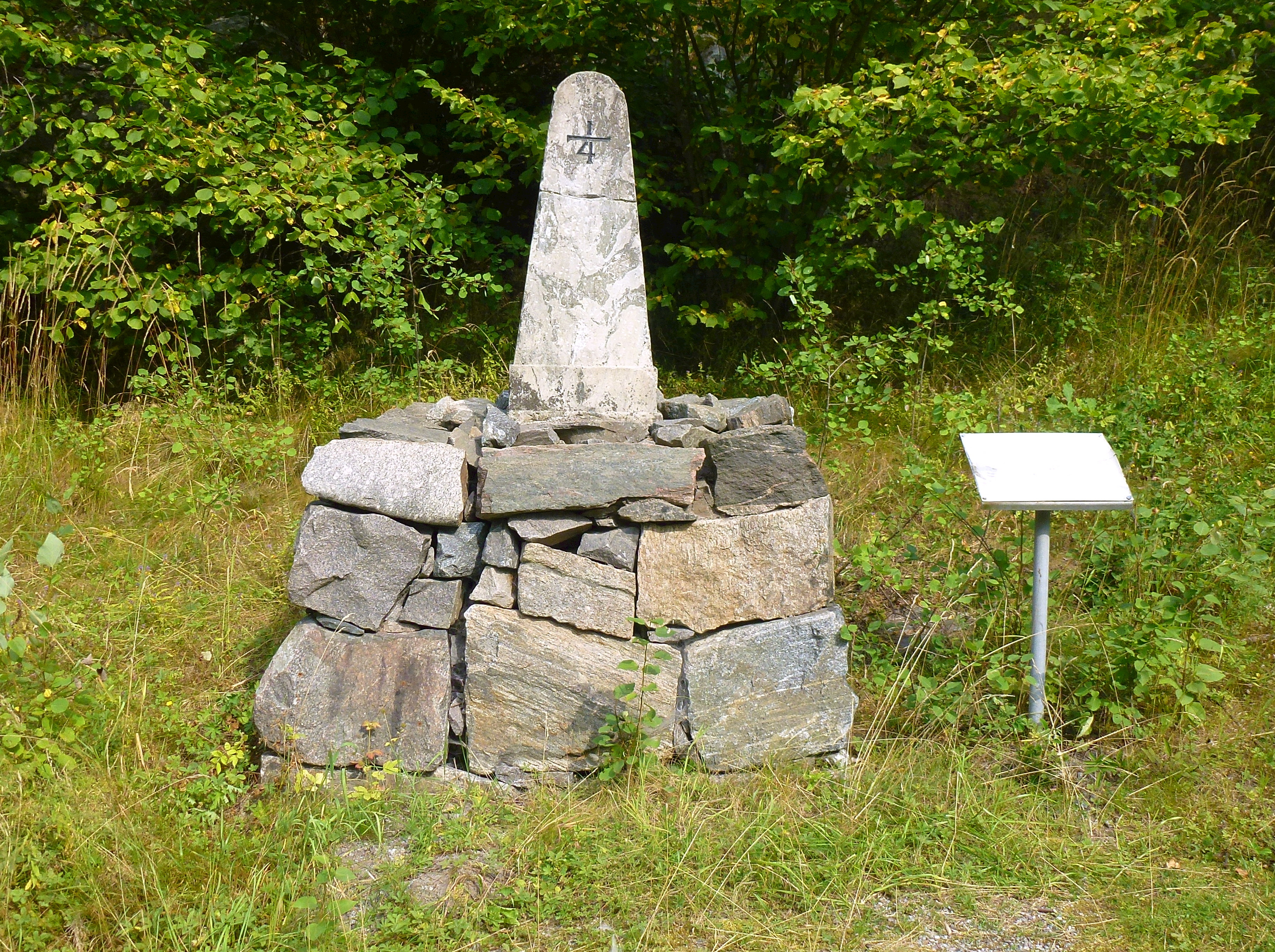 Milstolpe Värmdövägen